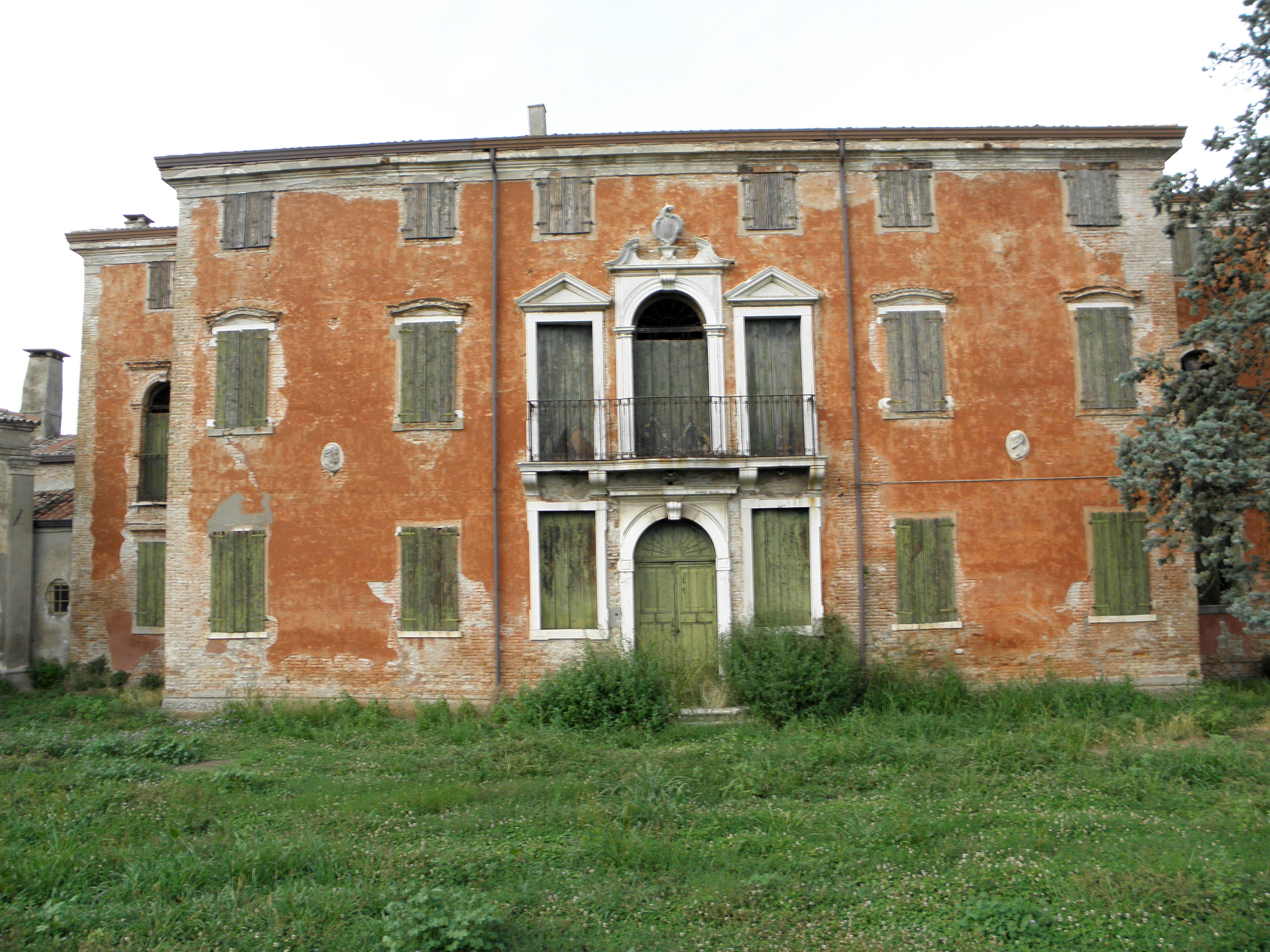 Tornova, frazione di Loreo: Villa Vianelli.